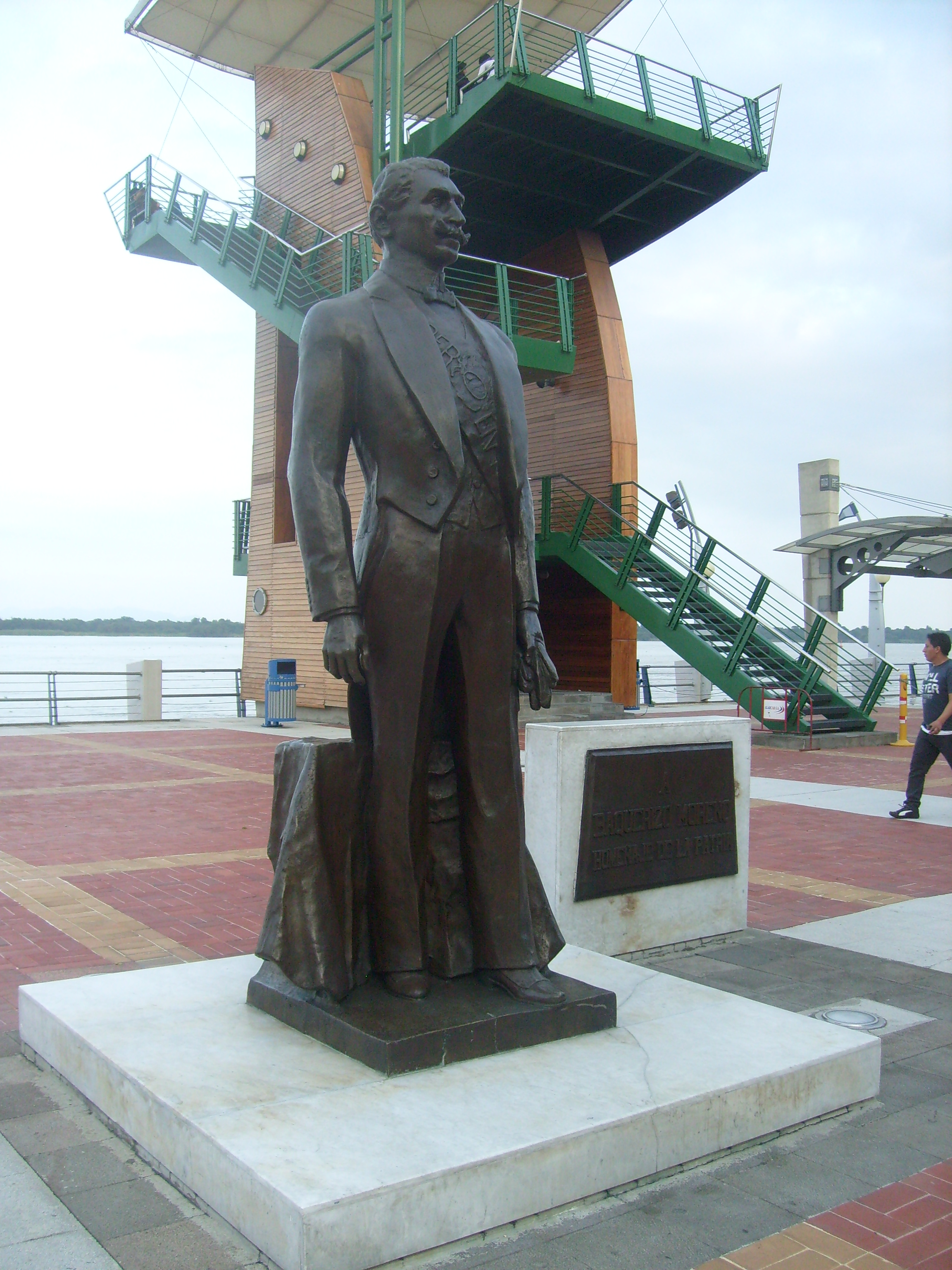 Es un Monumento en el Malecon 2000 de la ciudad de Guayaquil, en homenaje a Baquerizo Moreno, un ex presidente de la replúclica del Ecuador, quein goberno en el periodo de 1916 a 1920.